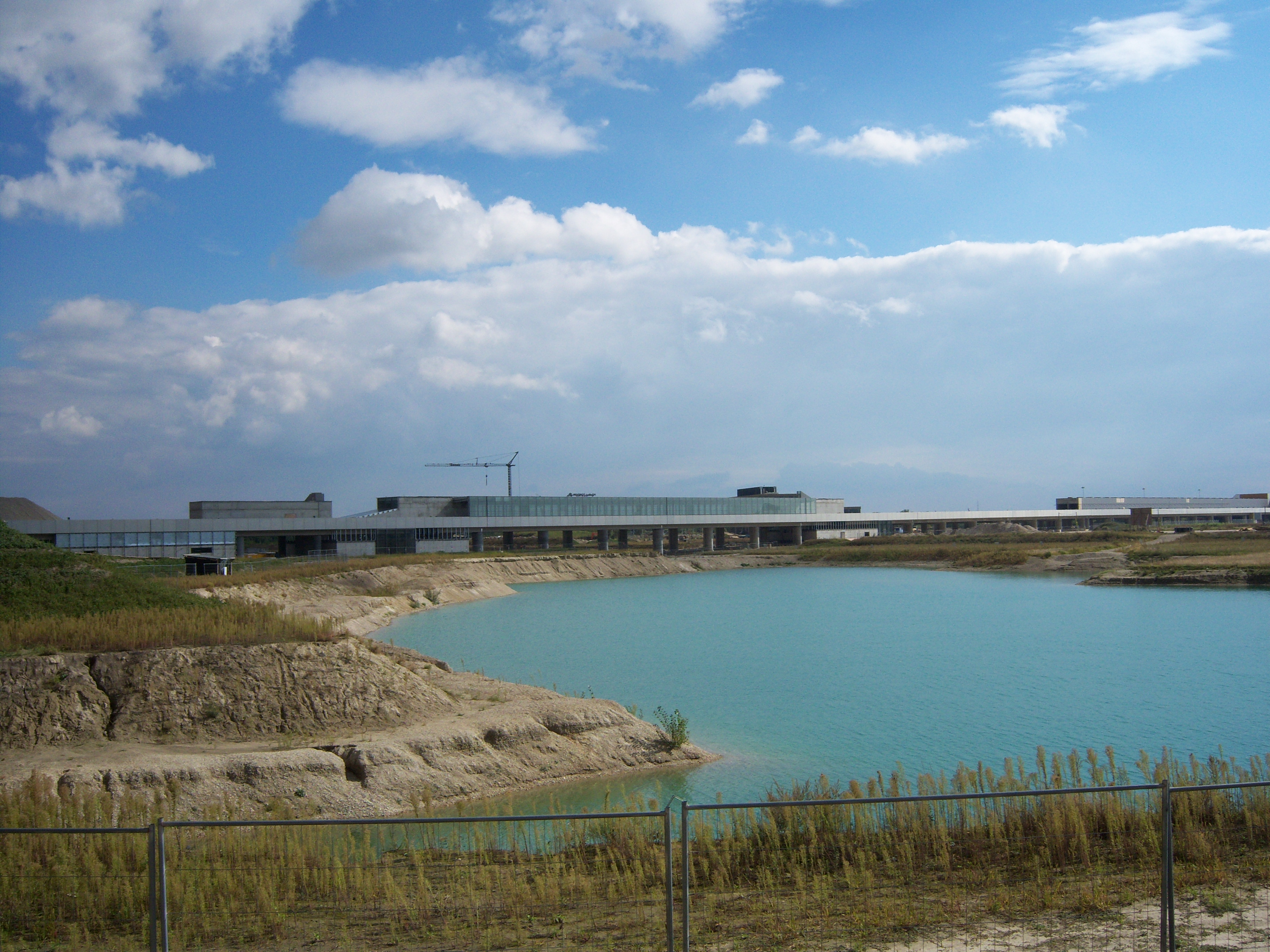 Seestadt Aspern